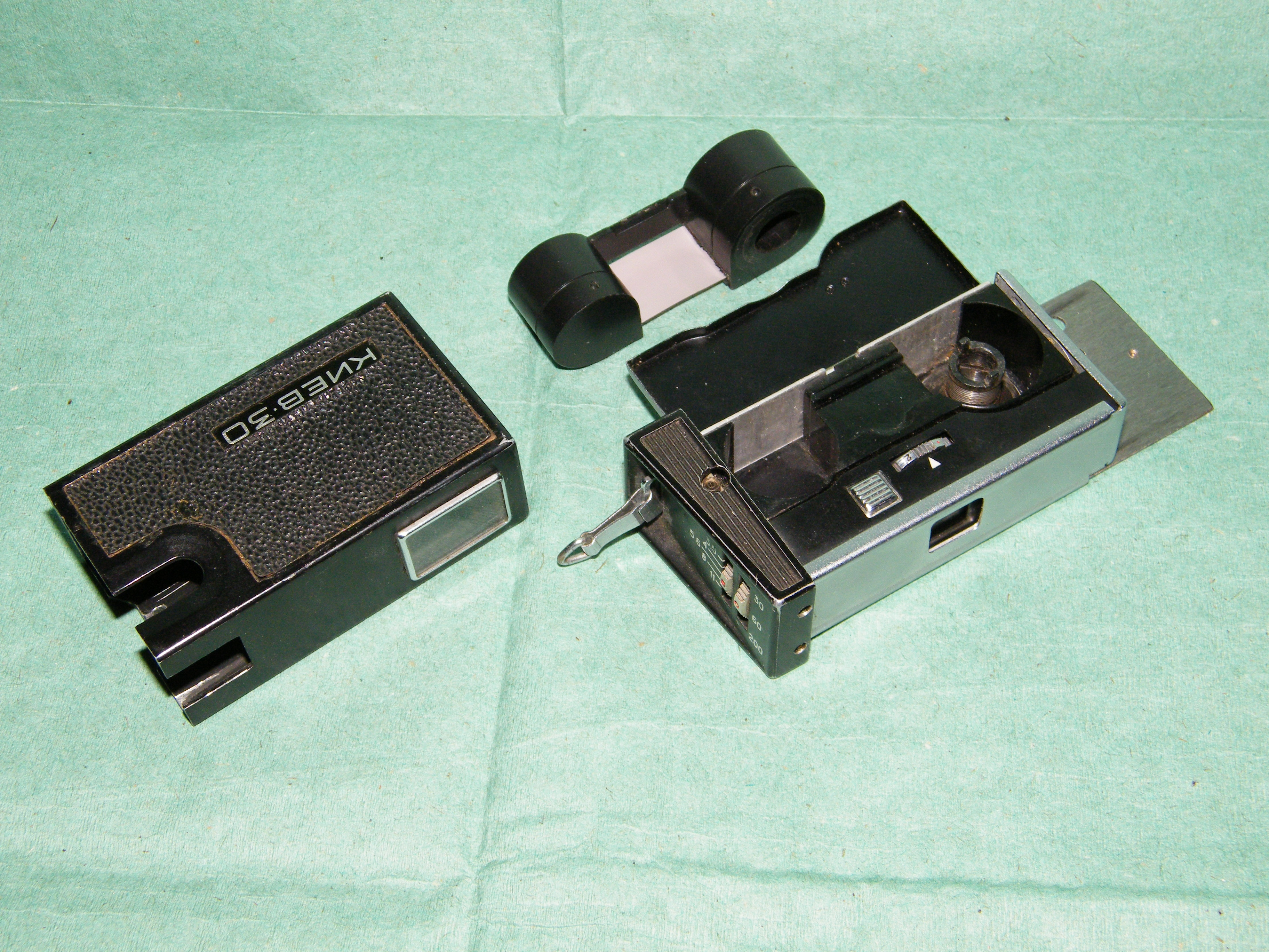 Фотоаппарат Киев-30